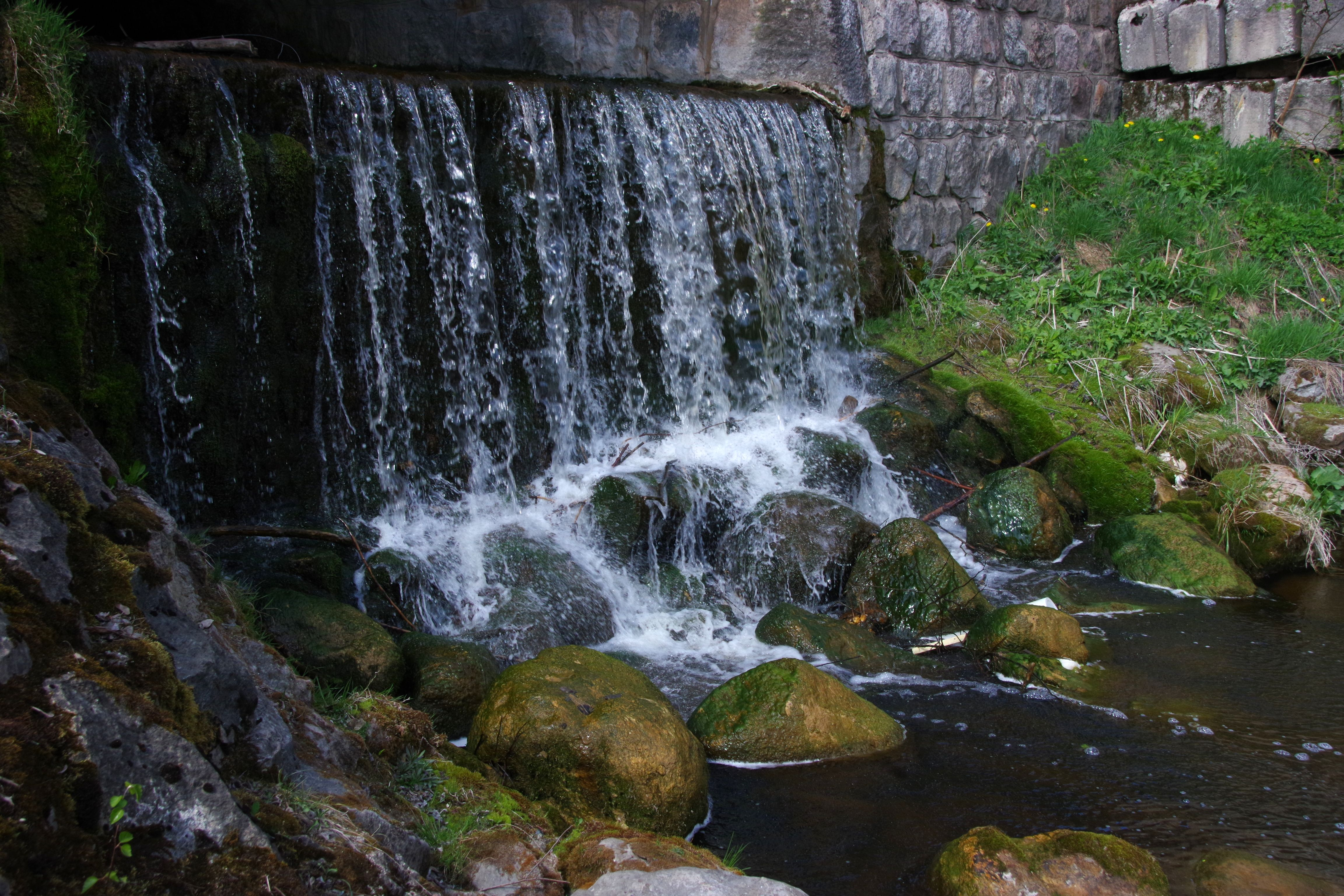 Kösti veski tamm asub Kösti ojal.